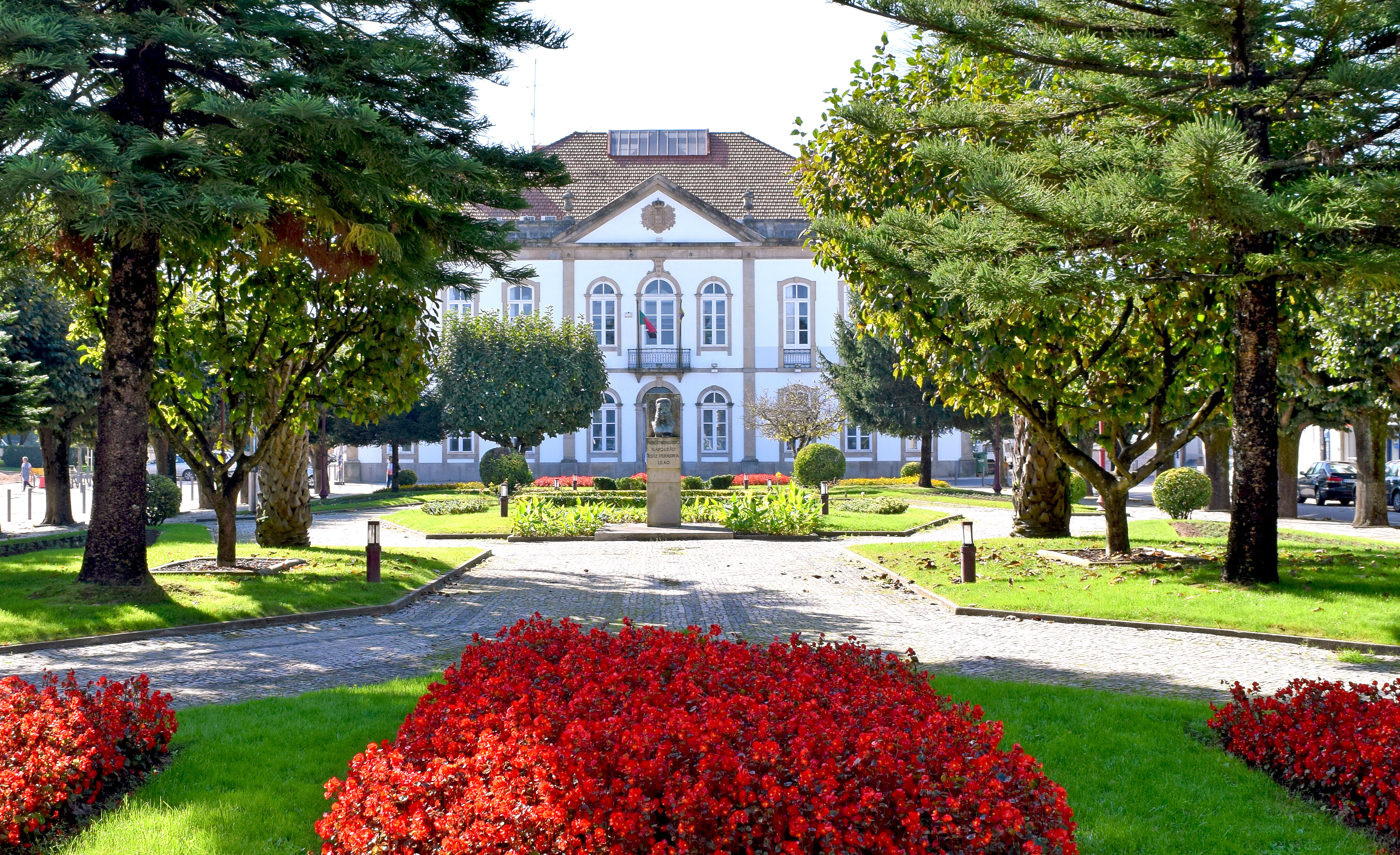 Câmara Municipal e Jardim da Praça Ferreira Tavares, em Albergaria-a-Velha